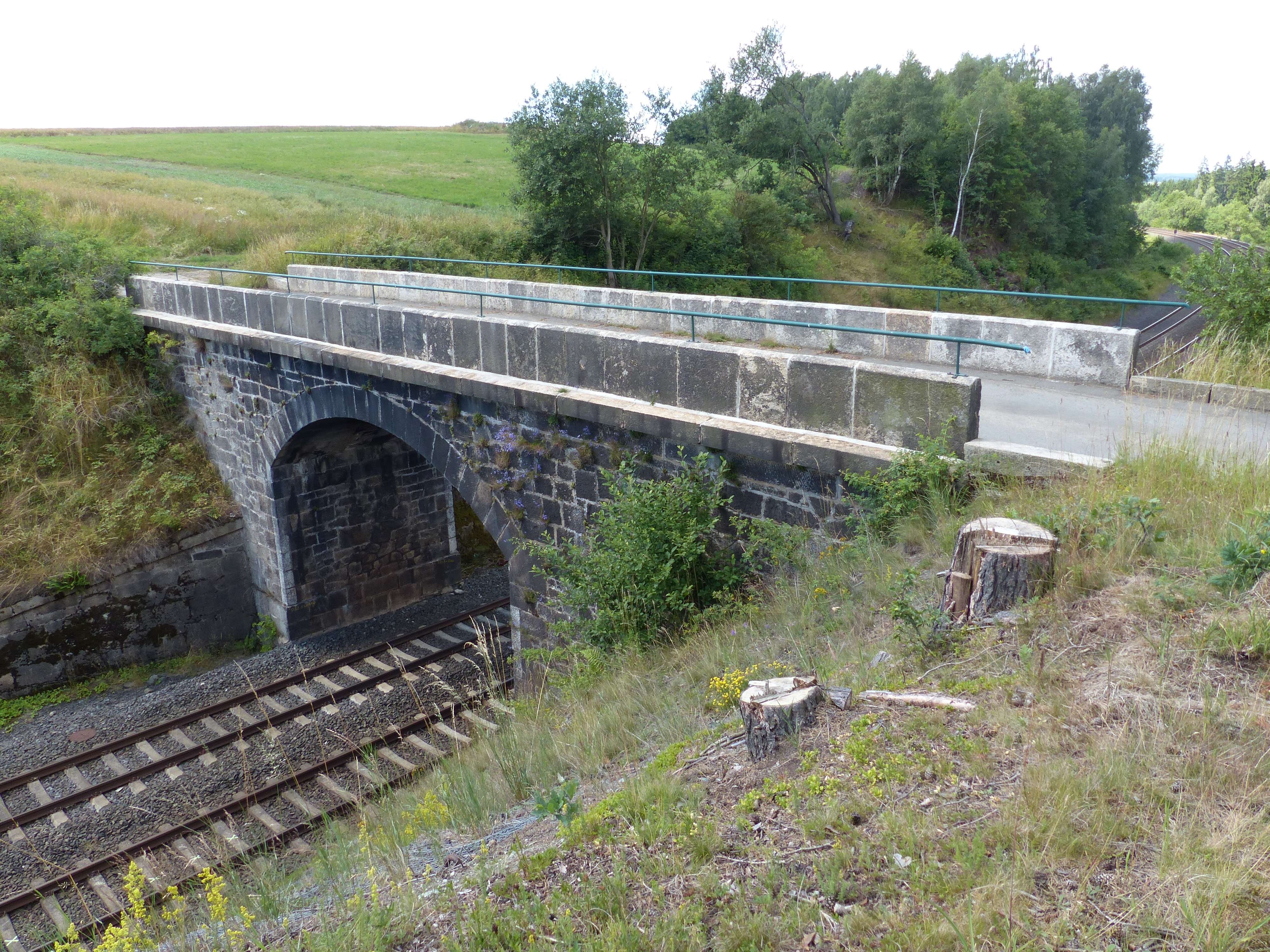 Schwingen, Ortsteil der stadt Schwarzenbach an der Saale